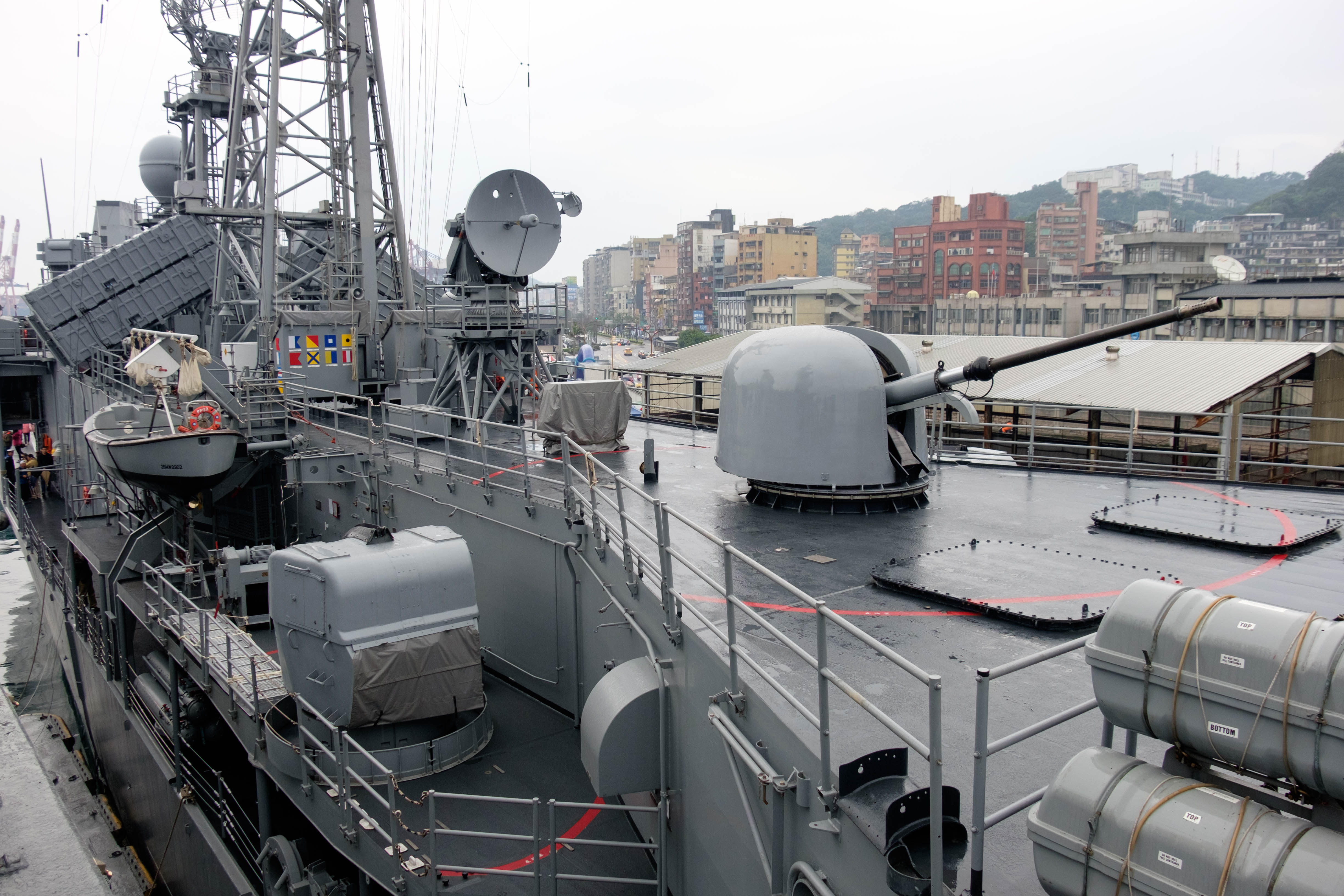 飛彈巡防艦張騫（PFG2-1109）上甲板中部的OTO Melara 76mm快砲（前）與Mk92導向飛彈射控系統用STIR（Separate Target Illumination Radar＼多目標標定雷達）天線（後），攝於海軍106年敦睦遠航訓練支隊基隆訪問。